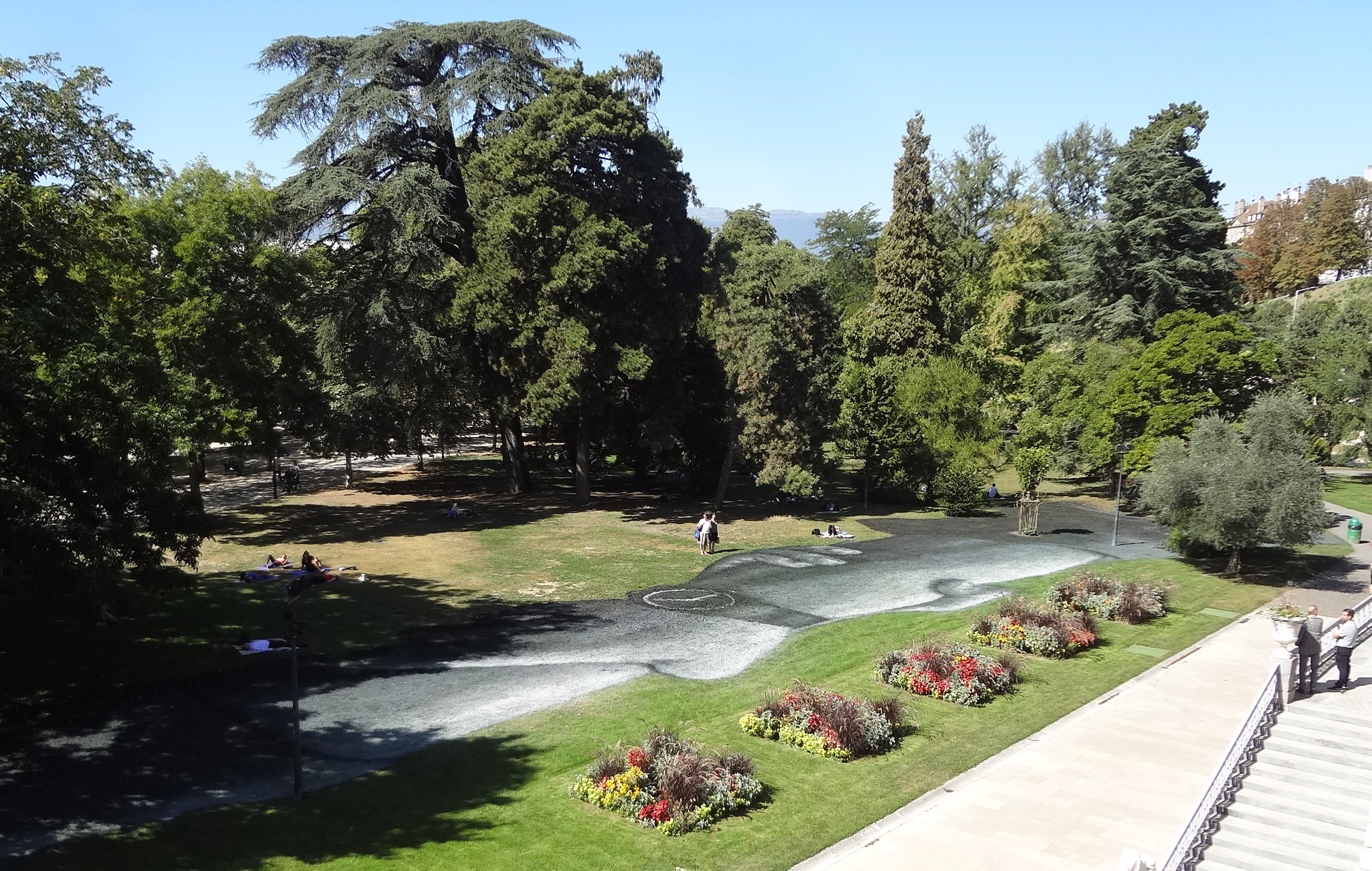 Beyond Walls par Saype, au Parc des Bastions à Genève, 2019.